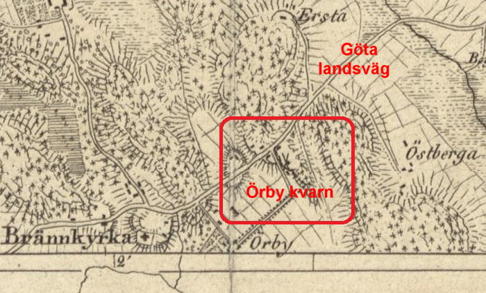 Del av 1817 års karta över Stockholm med omgivningar med Örby kvarn